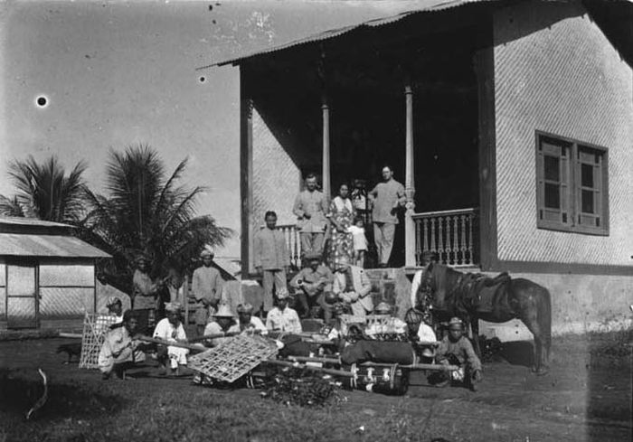 Foto. Midden-Java, huis van de familie Ottolander gelegen in Litjin, op 437 meter hoogte